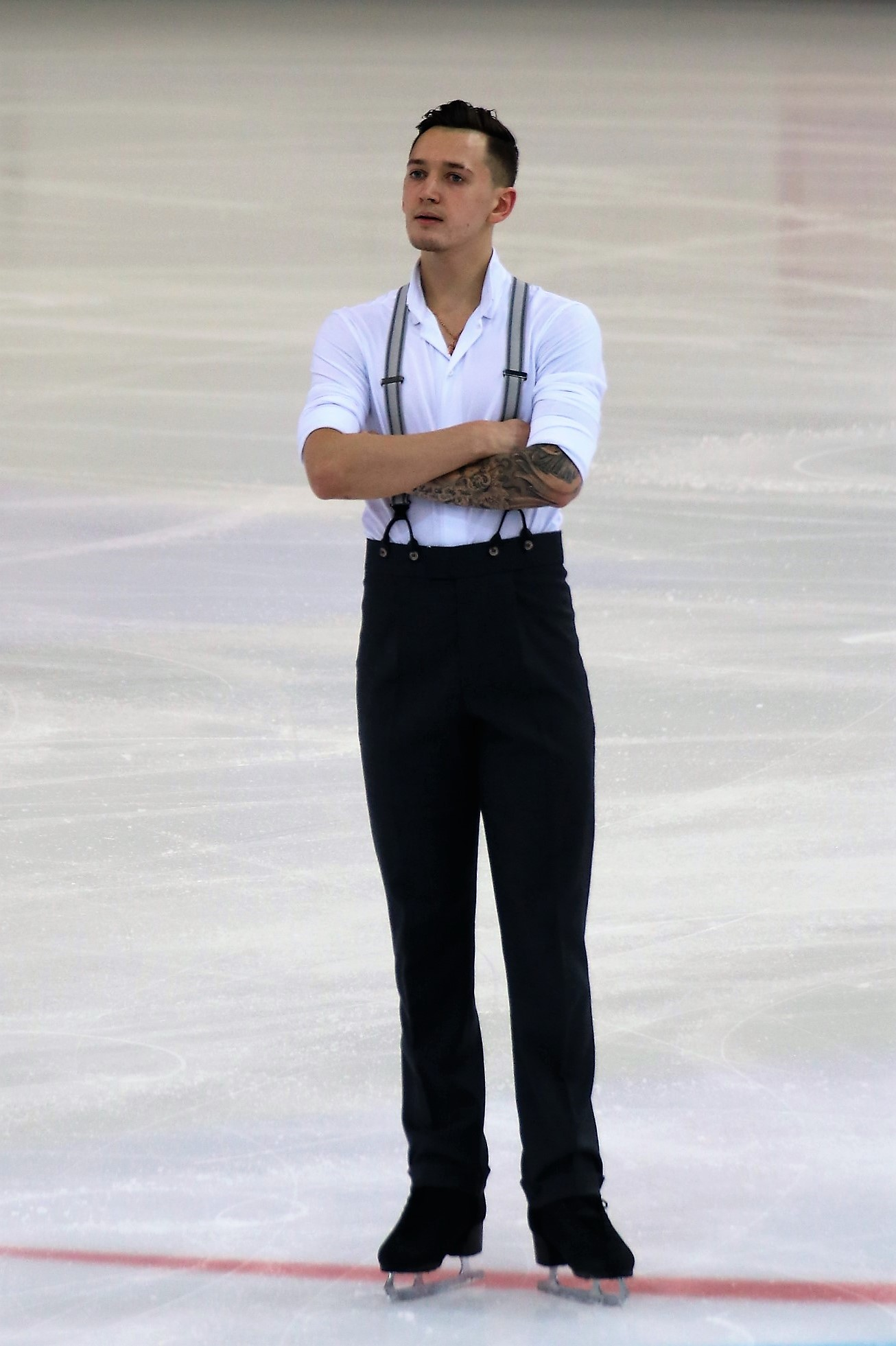 Максим Ковтун на чемпионате России по фигурному катанию на коньках 2019